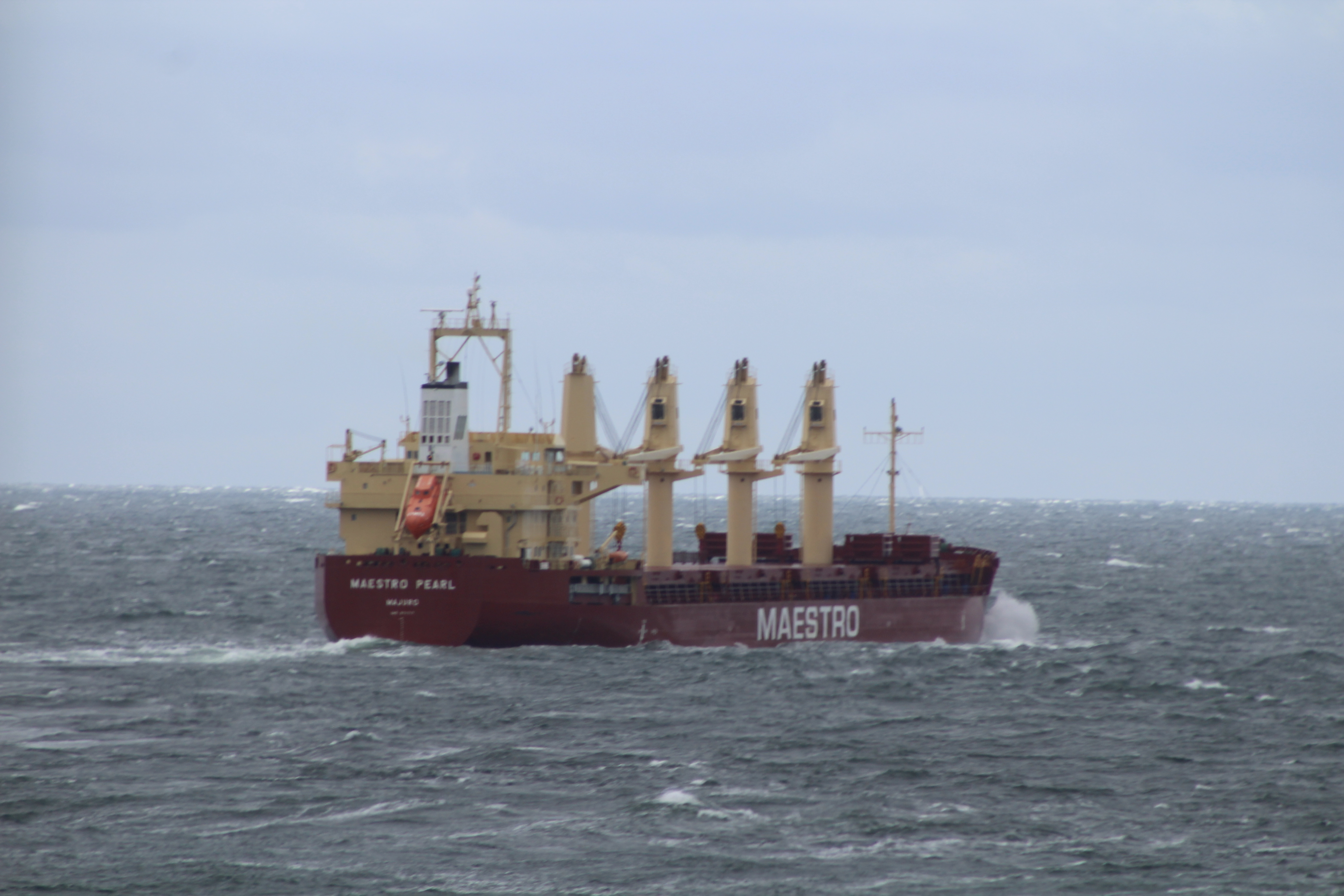 Der Frachter MAESTRO PEARL (IMO 9711717) Baujahr 2015 auf der Ostsee